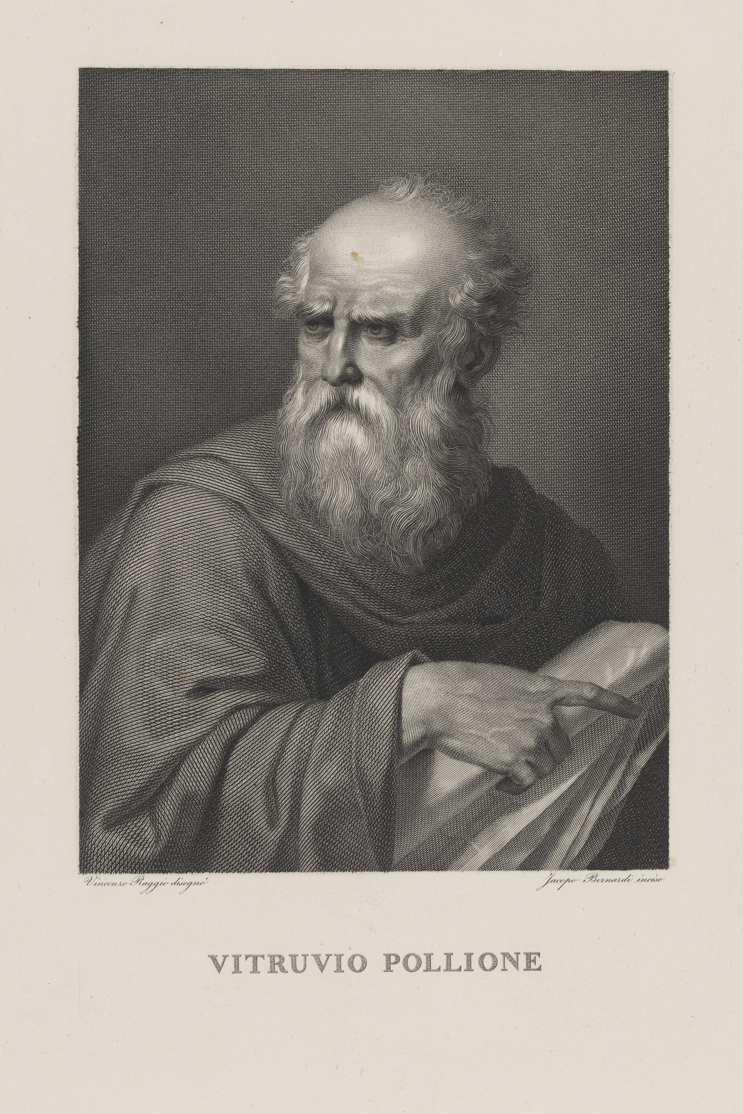 (Fantasie-)Bildnis des Vitruv, Kupferstich und Radierung 362 × 276 mm (14.25 × 10.87 in) (Platte), Bildunterschrift: Vitruvio Pollione